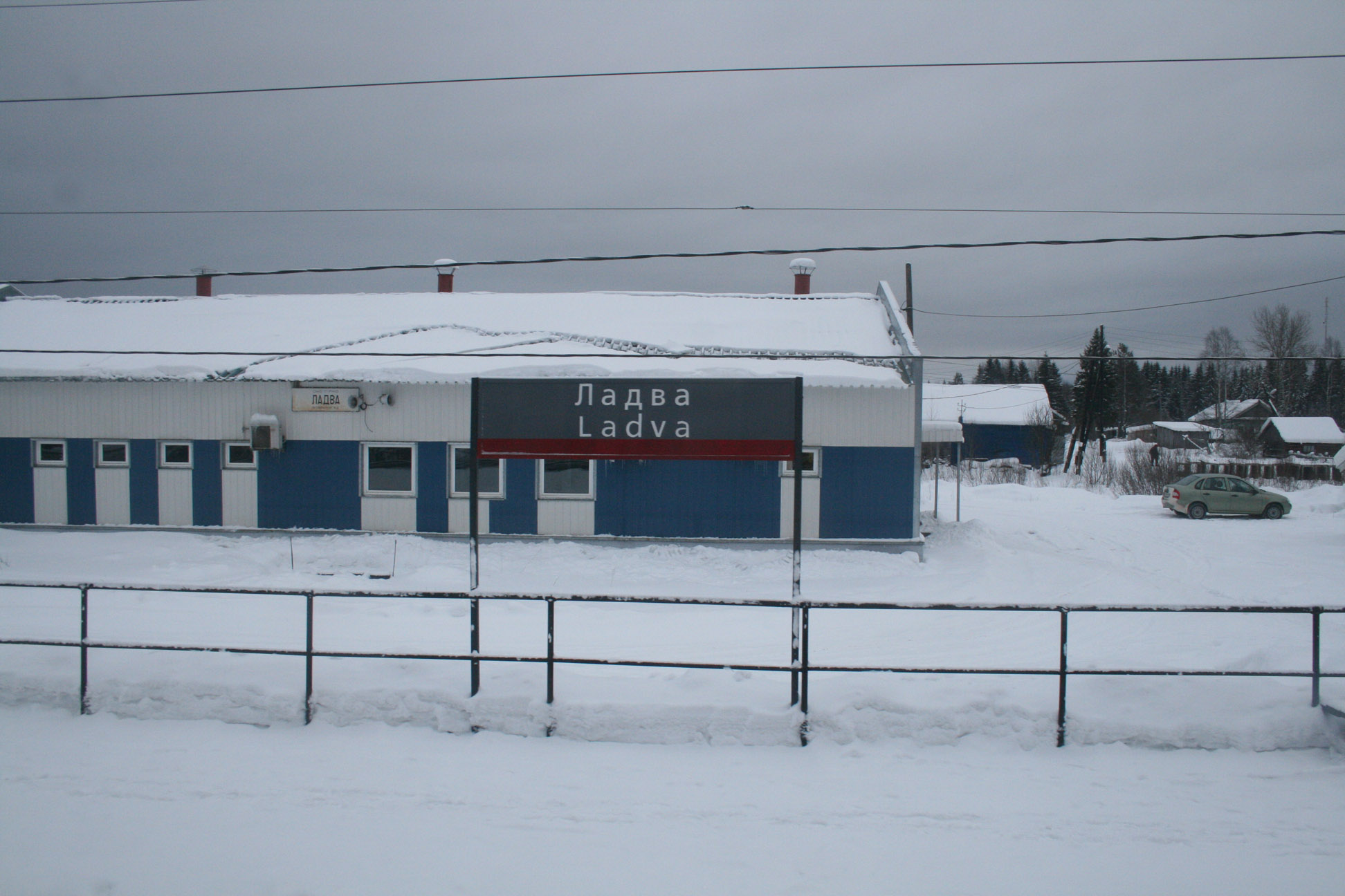 Железнодорожная станция "Ладва", Прионежский район Республики Карелия.